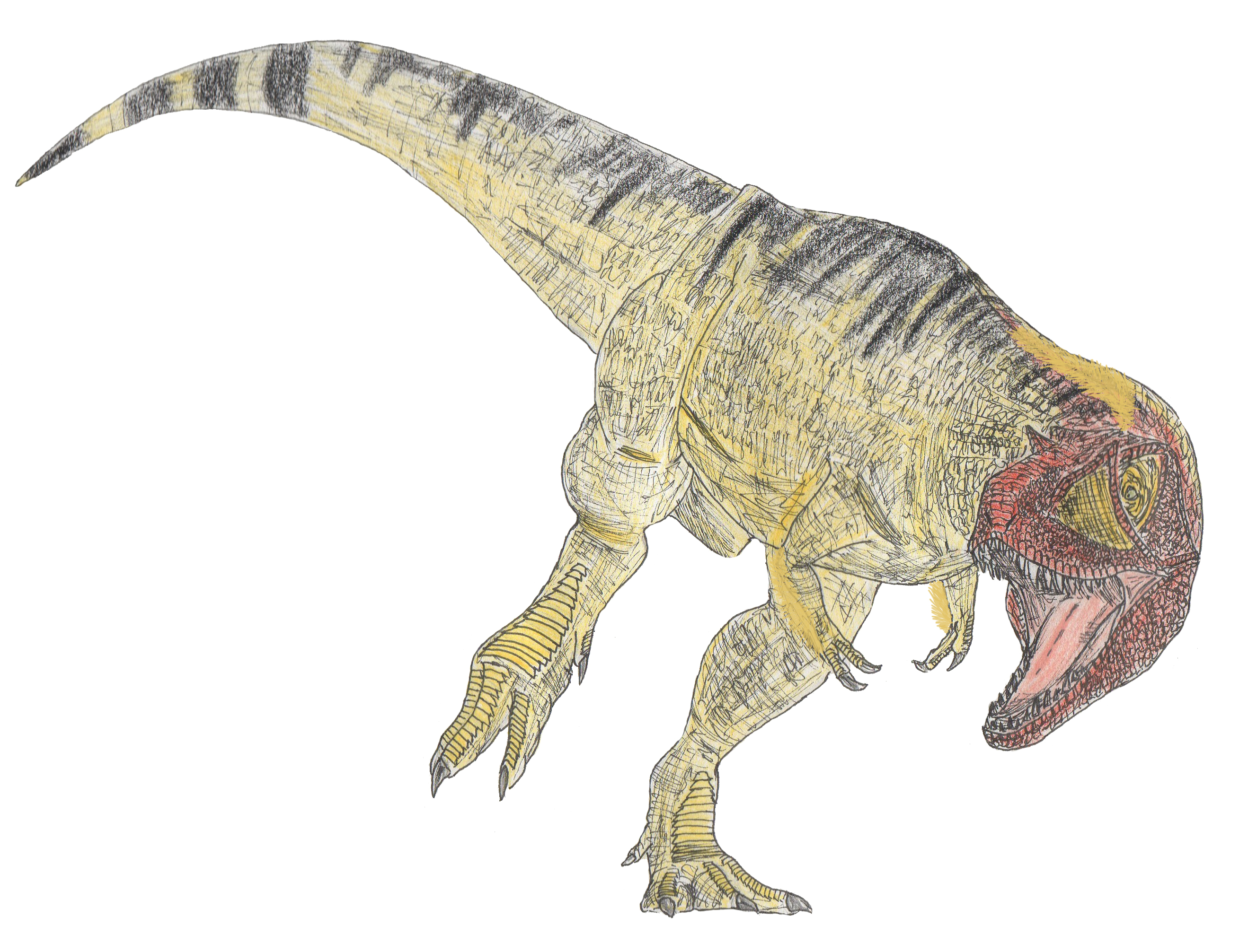 Teratophoneus